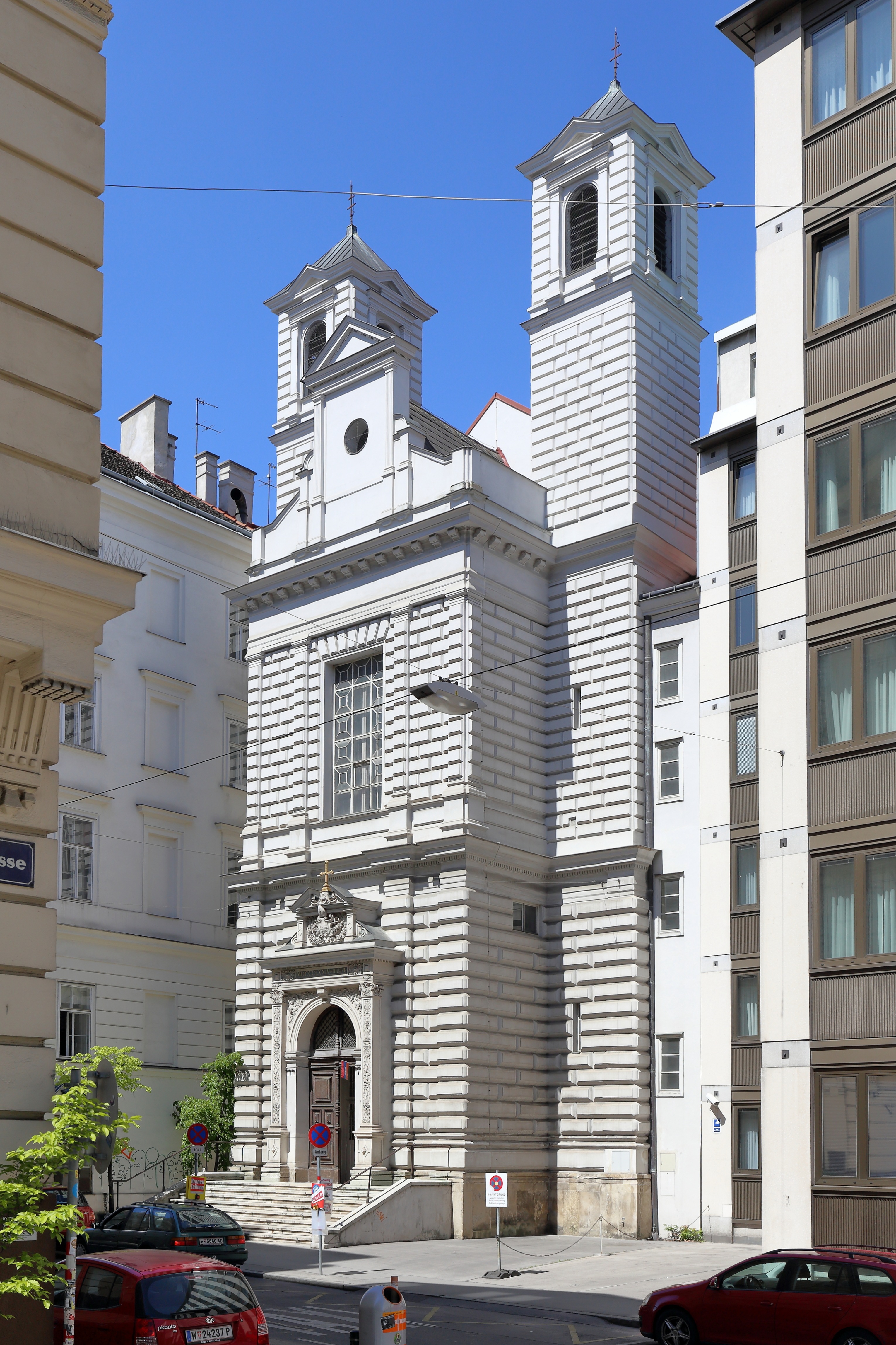 Die Mechitaristenkirche im 7. Wiener Gemeindebezirk Neubau.Ursprünglich war es die Klosterkirche des Kapuzinerklosters "Am Platzl" in der Vorstadt St. Ulrich. Nach Aufhebung des Klosters durch Joseph II. zogen Anfang des 19. Jahrhunderts die Mechitaristen ein. Nach einem Großbrand im Jahr 1835 wurde nach Plänen von Josef Georg Kornhäusel das Kloster zum Teil neu errichtet.Die Kirche selbst wurde von 1871 bis 1873 von Fritz Sitte und seinem Sohn Camillo im Stil der Neurenaissance neu errichtet, nachdem die Vorgängerkirche behördlich wegen Baufälligkeit gesperrt worden war.